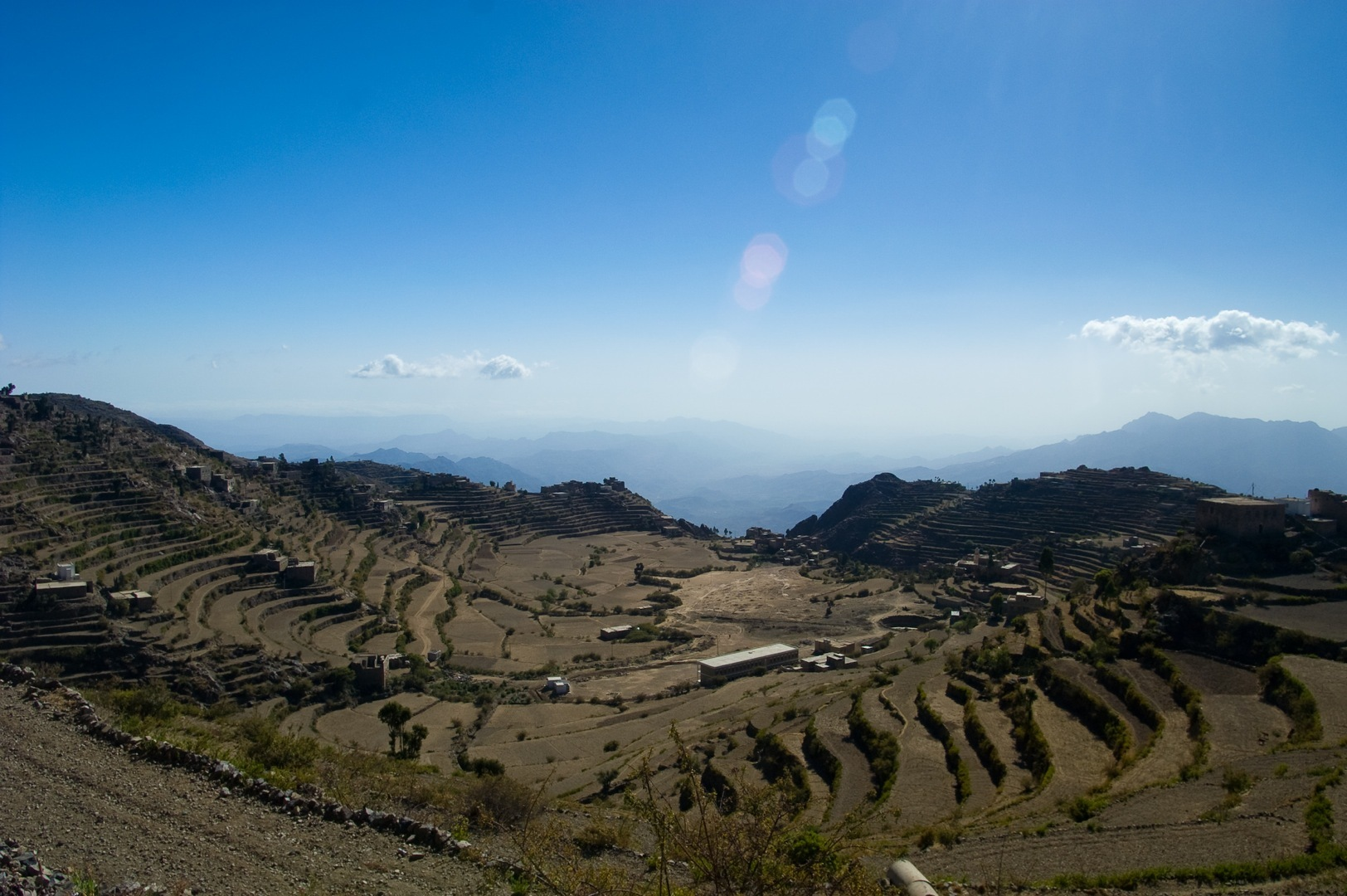 تعز